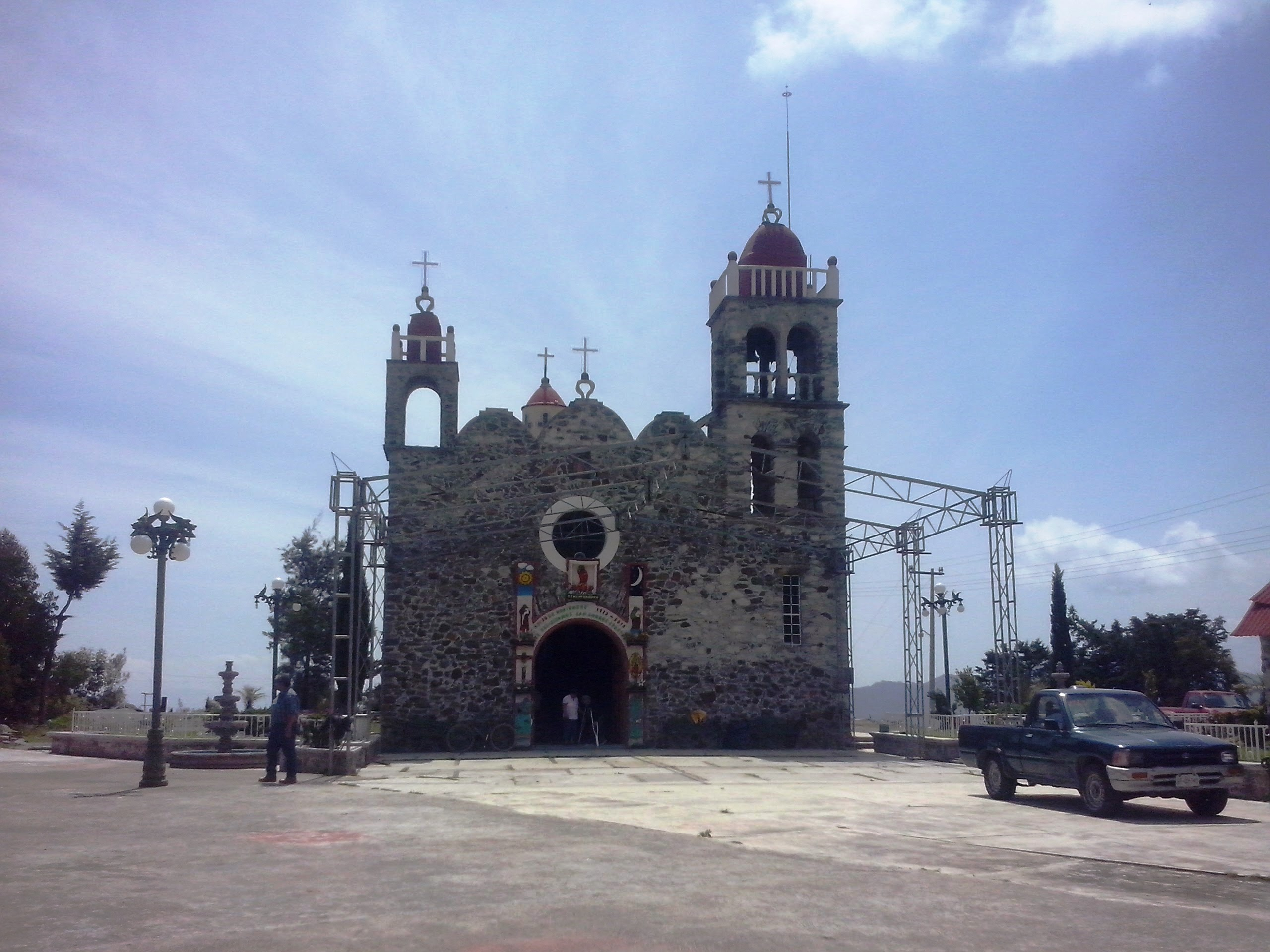 San Andrés Tianguistengo, Actopan, Hidalgo, México